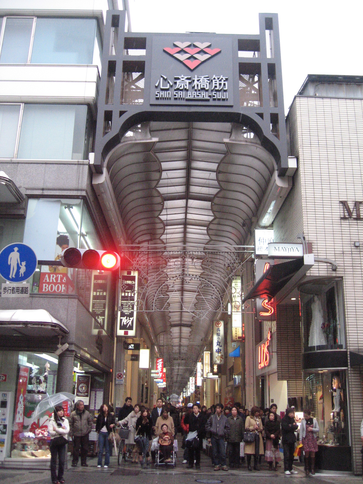 Shinsaibashi, Osaka, Kansai Region.